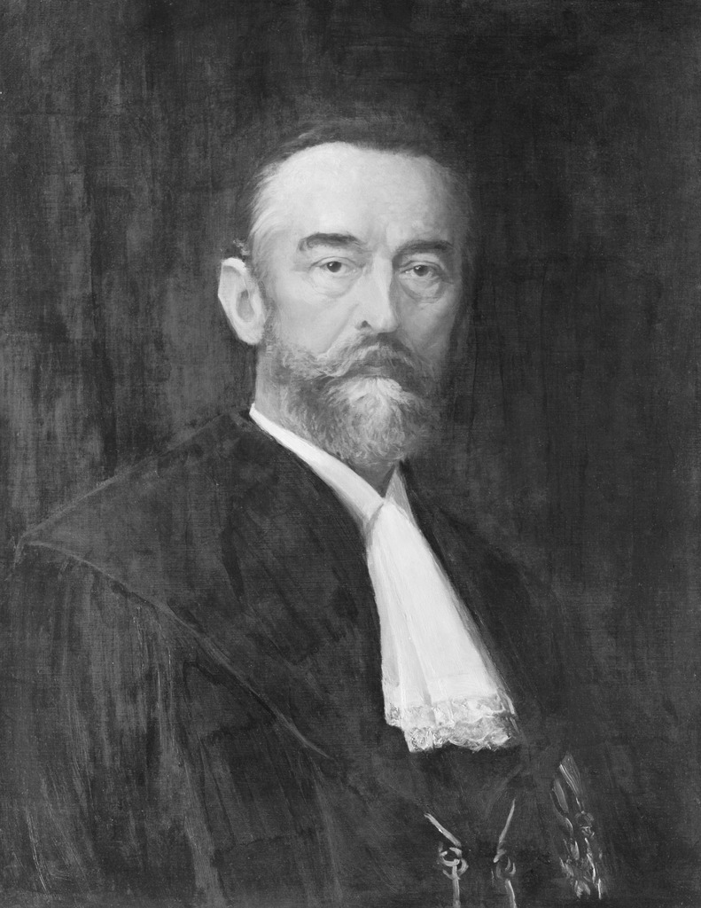 Dr. med. Philipp Jakob Wilhelm von Henke (* 19.06.1834 in Jena; † 17.05.1896)